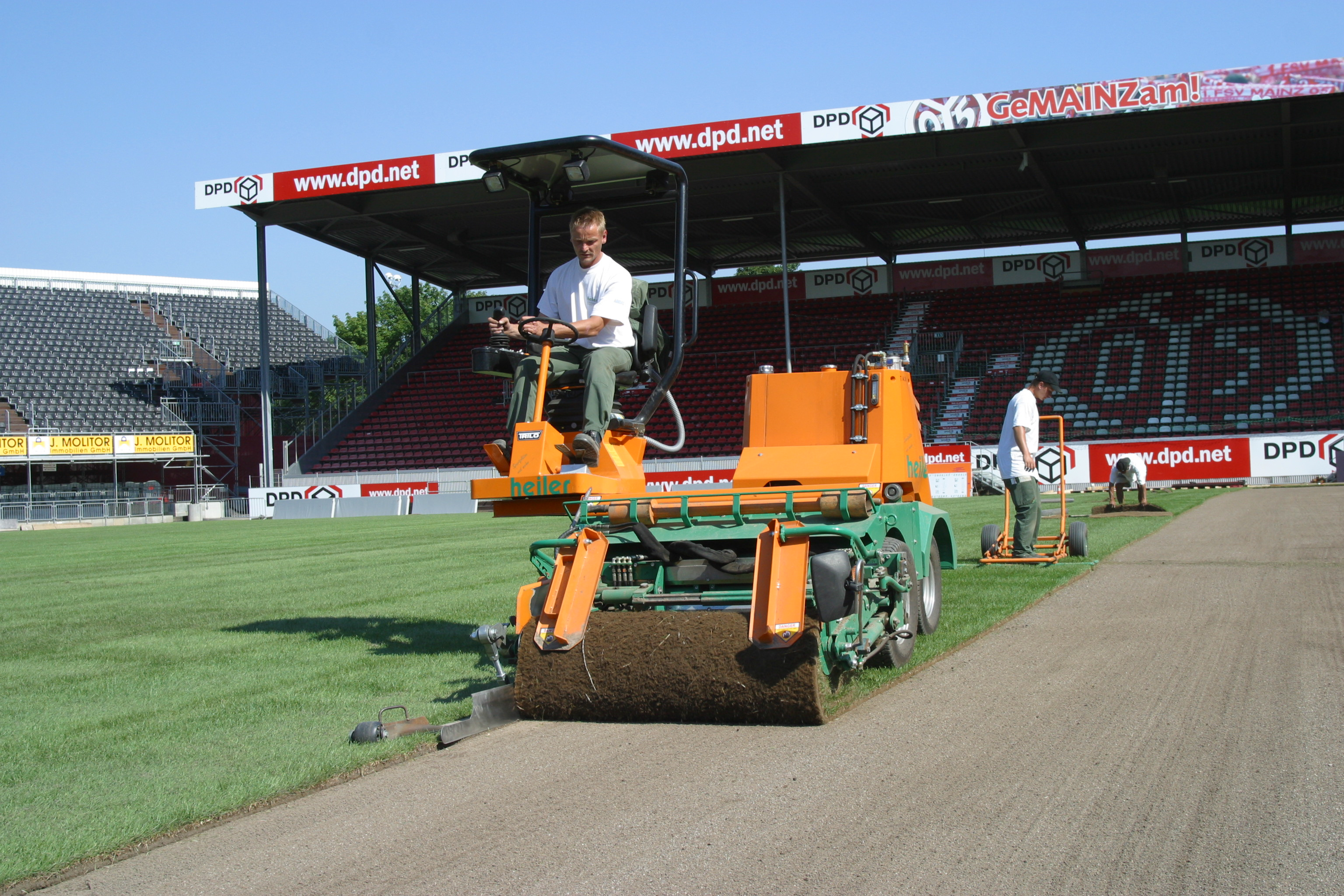 Die Firma heiler verlegt Rollrasen im Mainzer Stadion